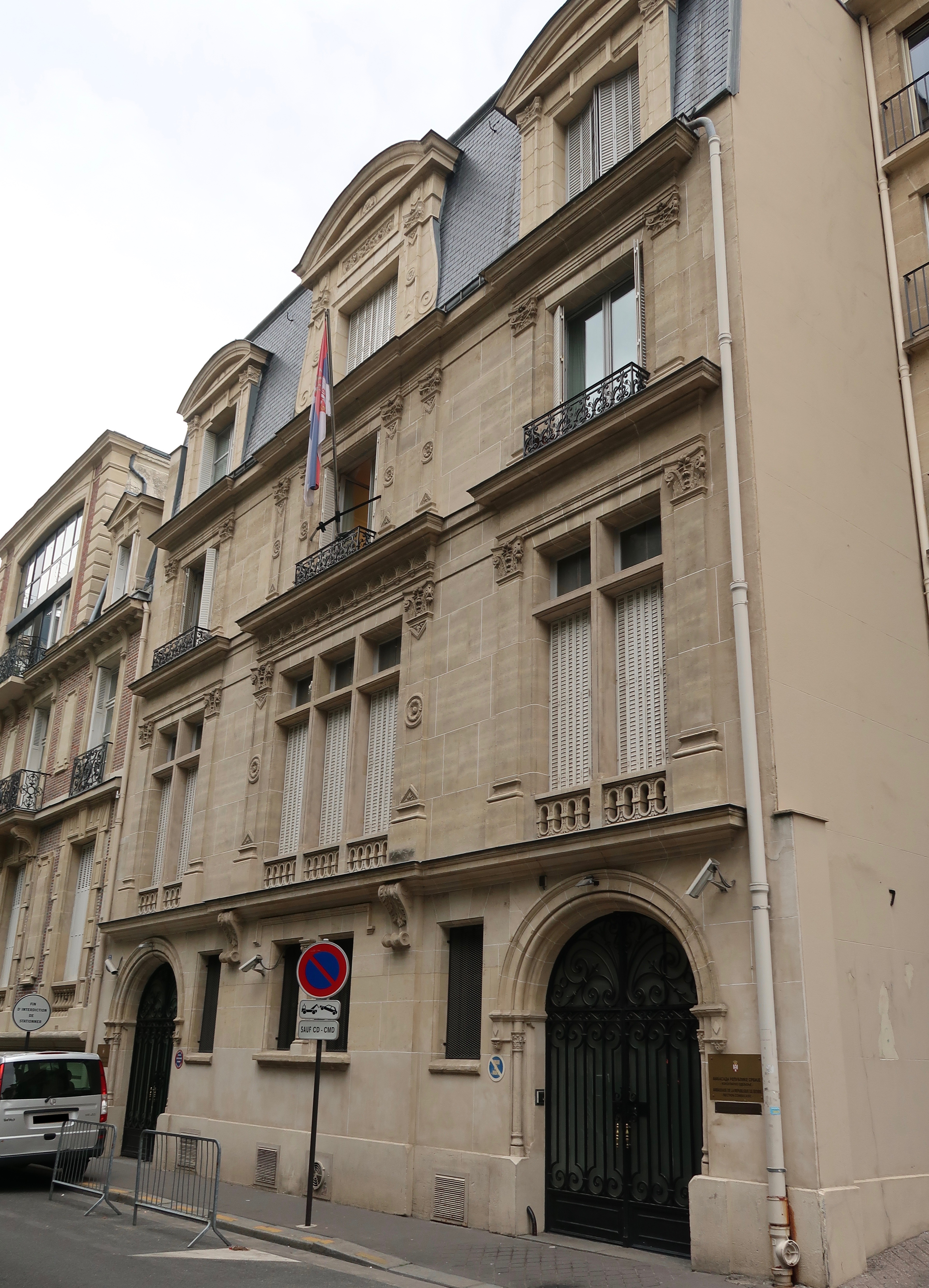 Ambassade de Serbie en France, 5 rue Léonard-de-Vinci (Paris, 16e).